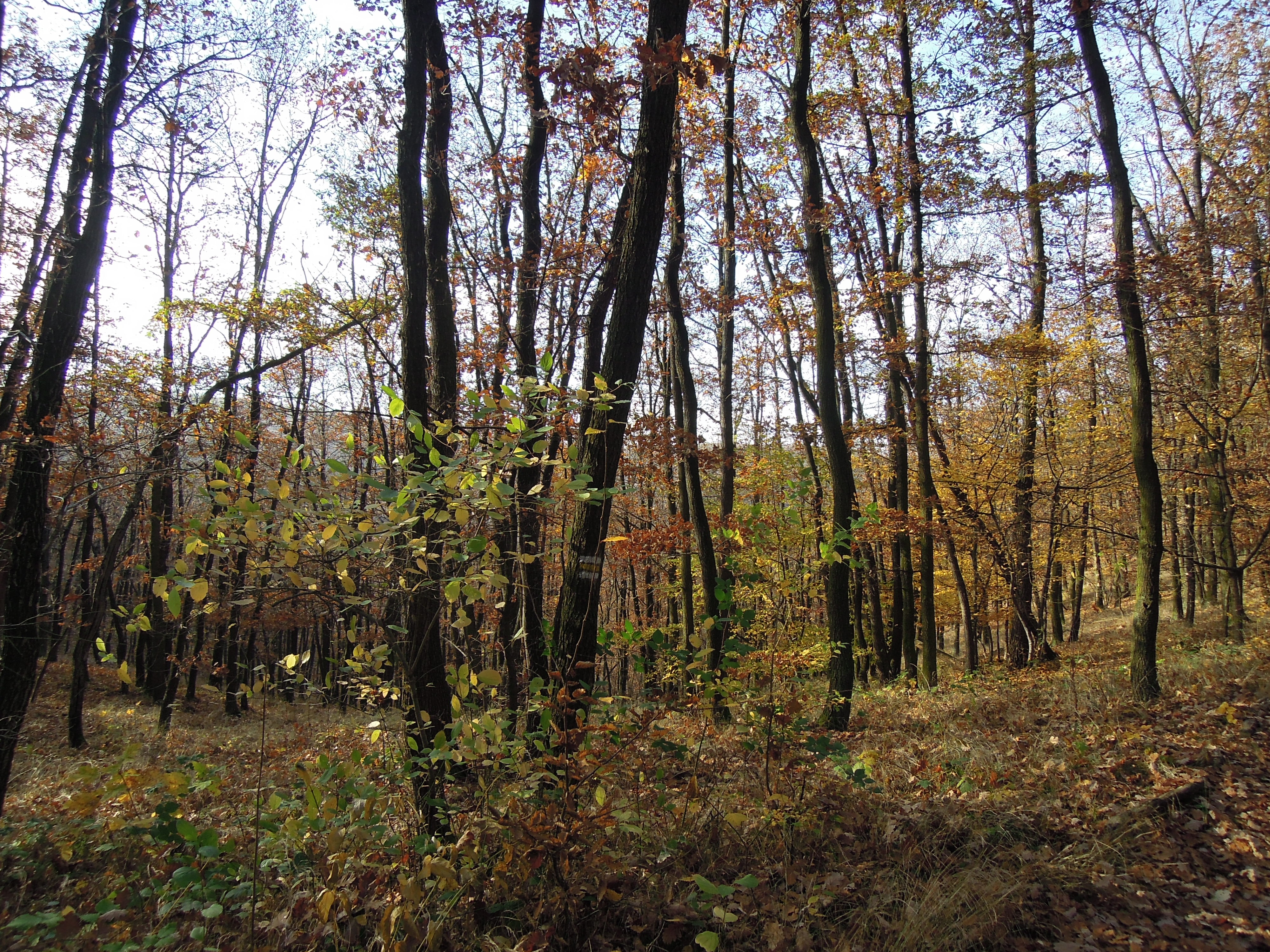 podzimní les, přírodní rezervace Šance